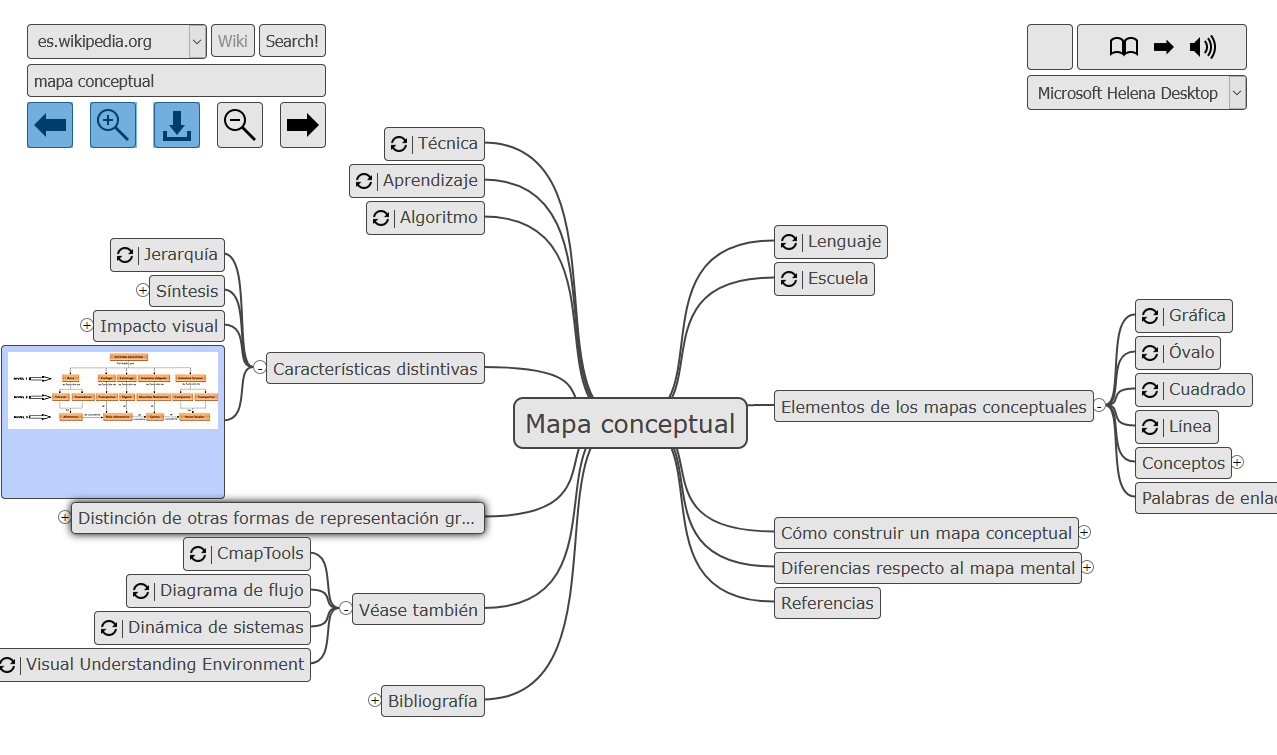 ( erabiliz egindako kontzeptu mapa bat